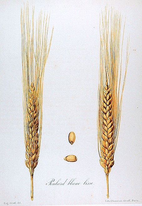 Lithographie Eugène Graff 1897